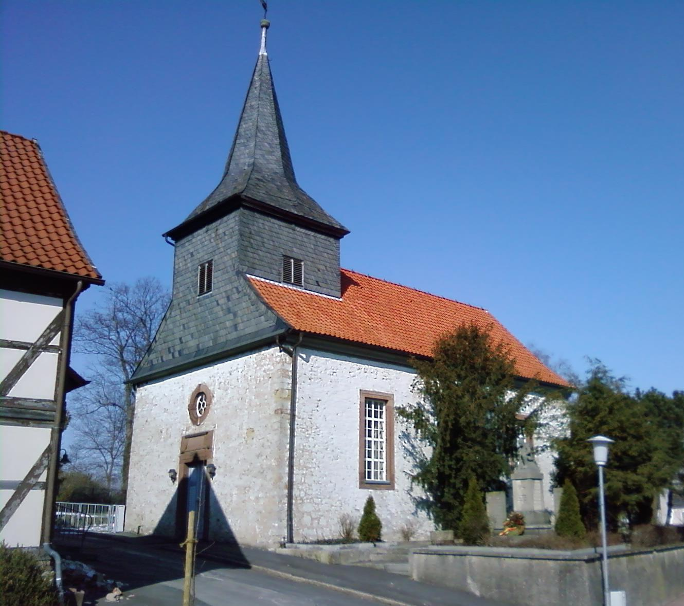 Die Michaeliskirche in Harbarnsen, Landkreis Hildesheim, Niedersachsen, Deutschland